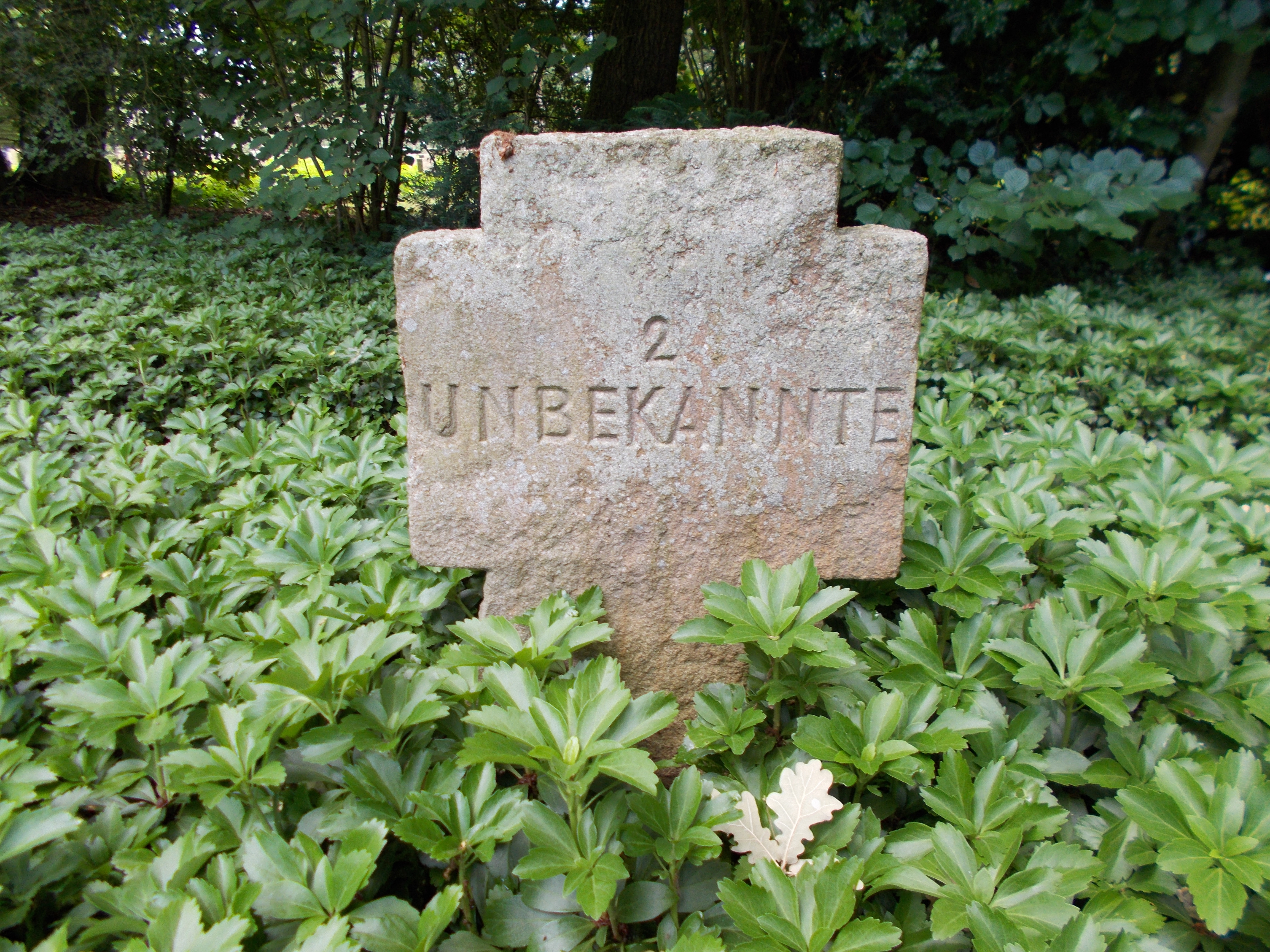 Deutscher Soldatenfriedhof am Niersenberg in Kamp-Lintfort. Grab für 2 unbekannte Soldaten.